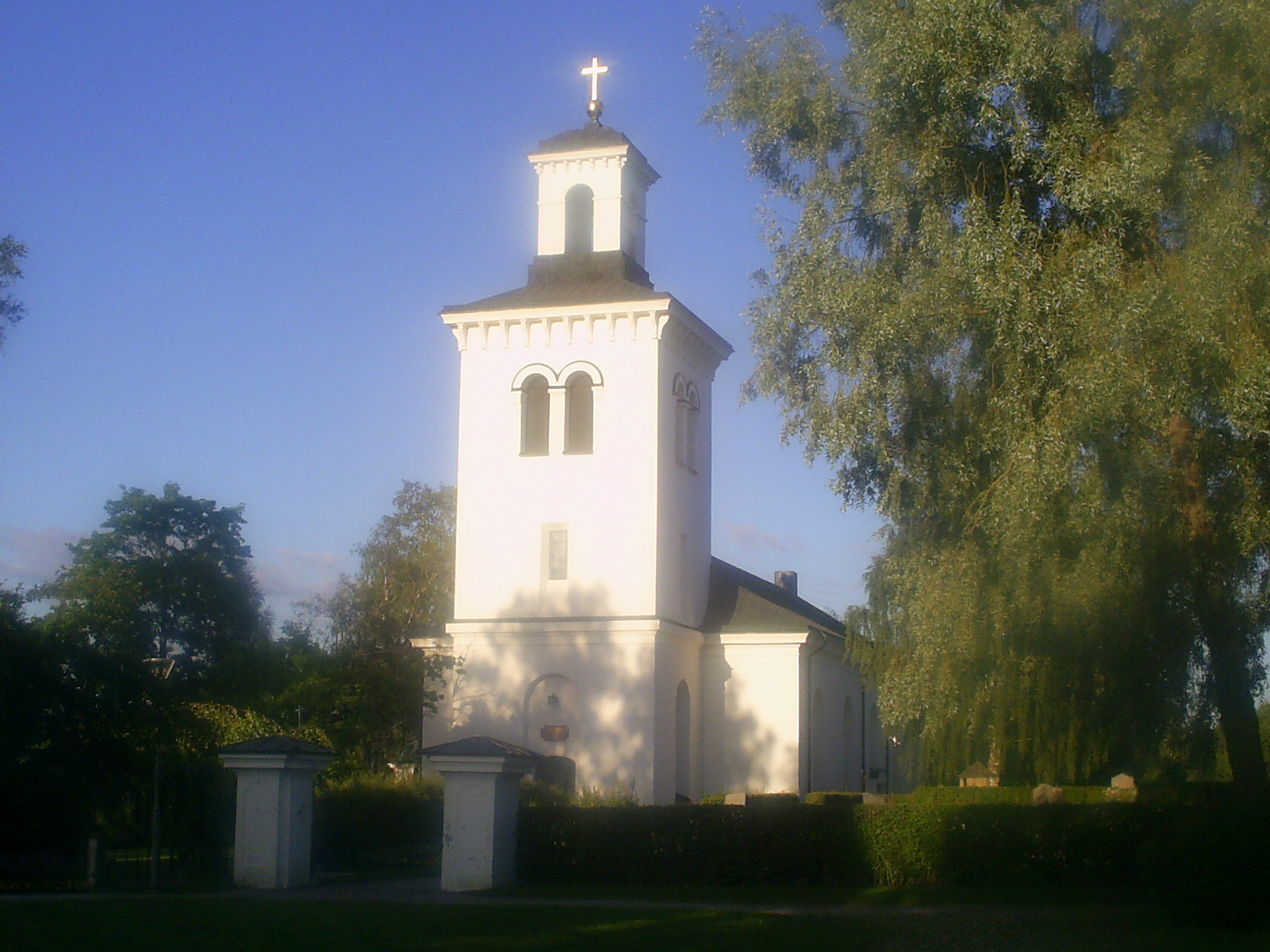 Gudmundrå kyrka